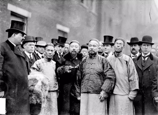 戴鸿慈、端方一行在美国考察宪政，1906年拍摄于芝加哥